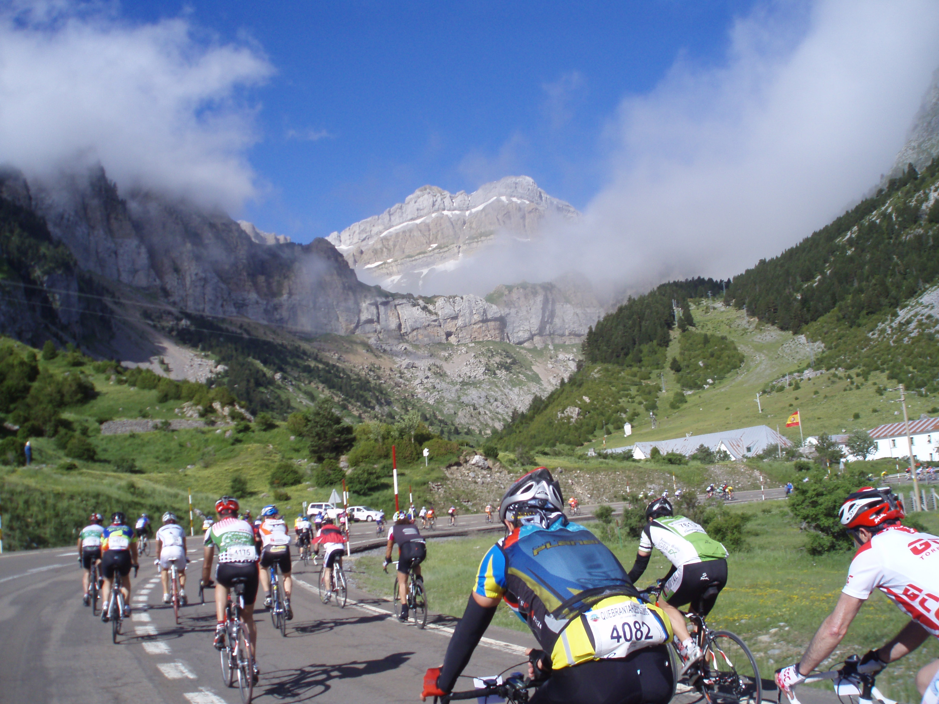 Inicio en la carretera de la Marcha Cicloturista Quebrantahuesos en su edición de 2010.